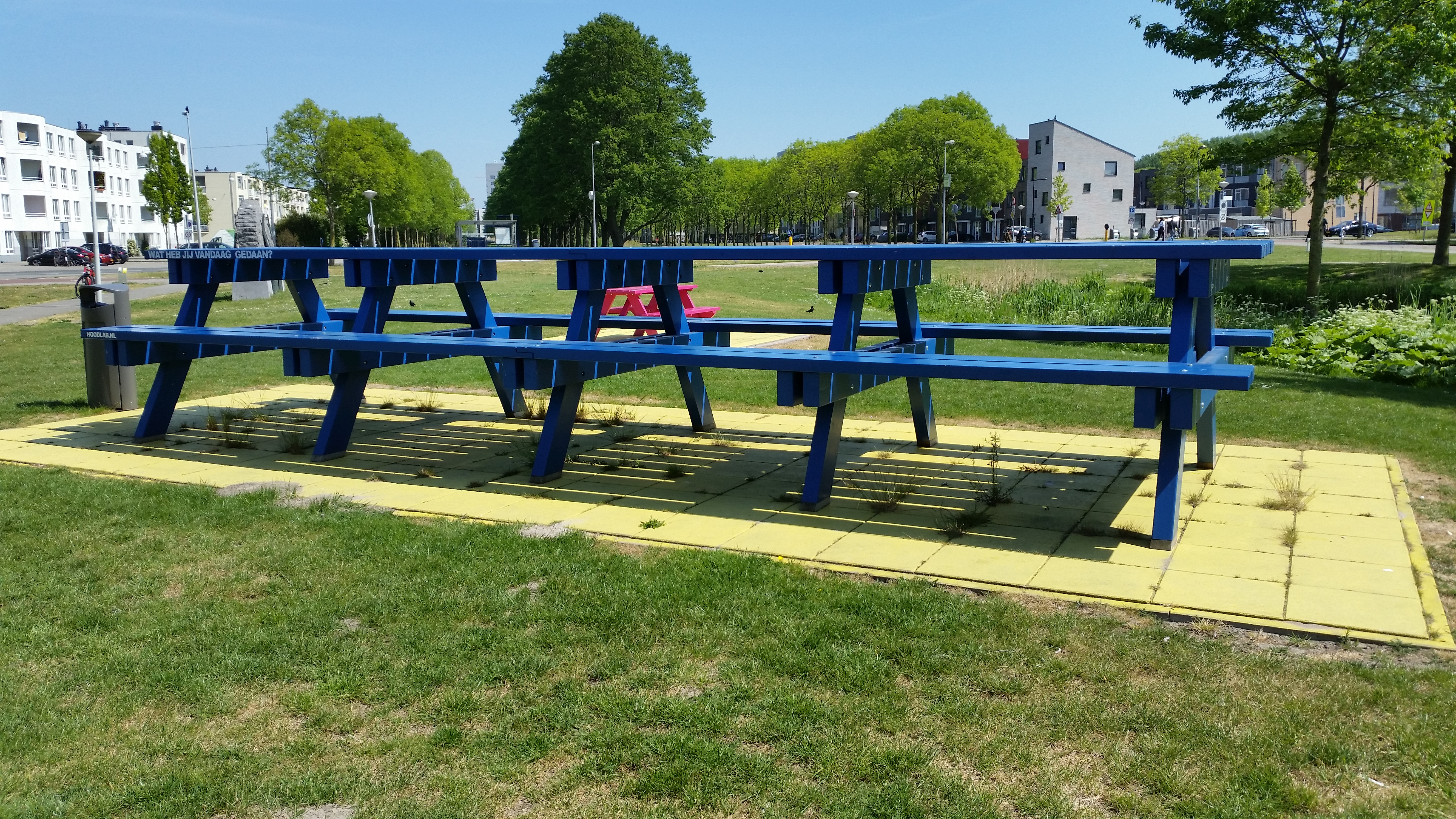 Impressie picknicktafels Venserpolder (mei 2020)